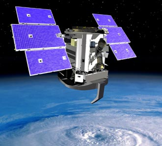 CloudSat observing clouds